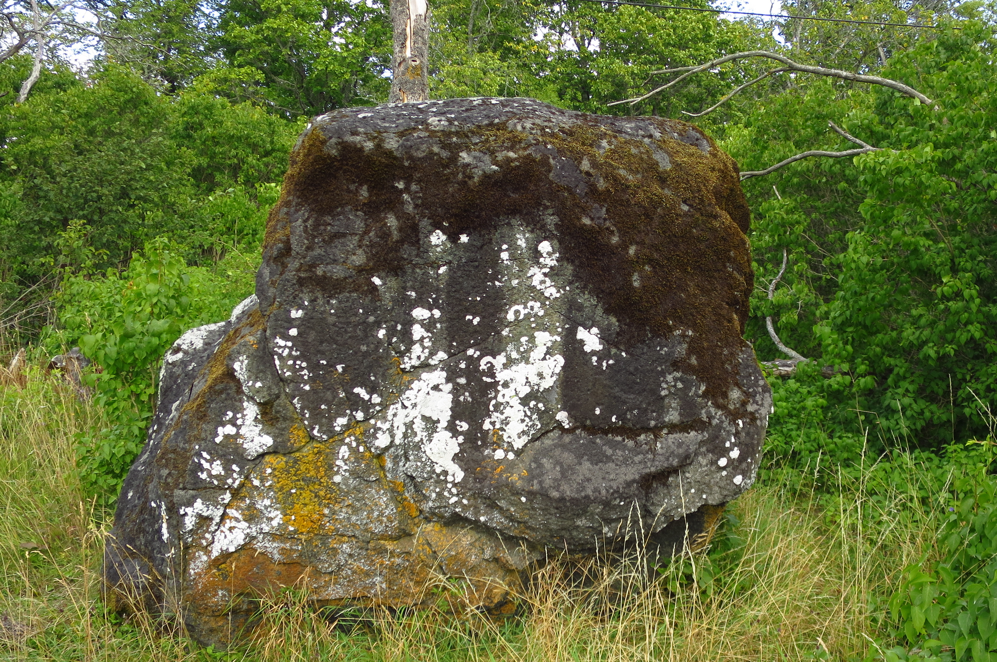 Vanapagana kivi Hiiumaal